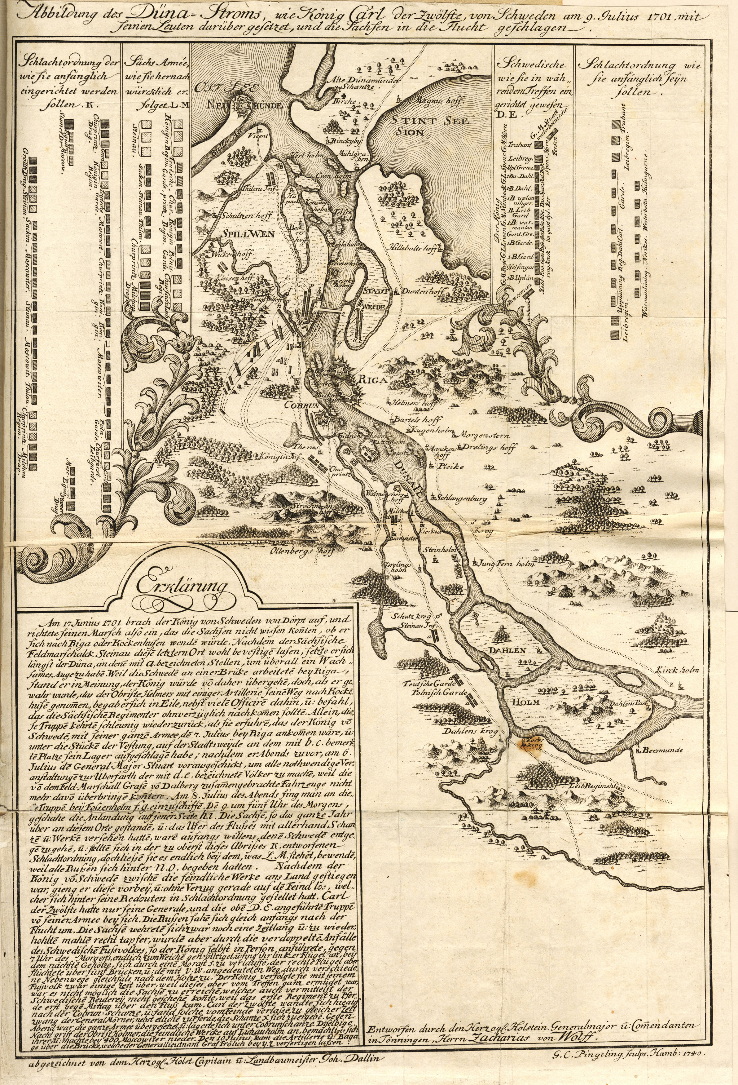 Abbildung des Düna-Stroms, wie König Carl der Zwölfte von Schweden am 9. Julius 1701 mit seinen Leuten darüber gesetzet und die Sachsen in die Flucht geschlagen